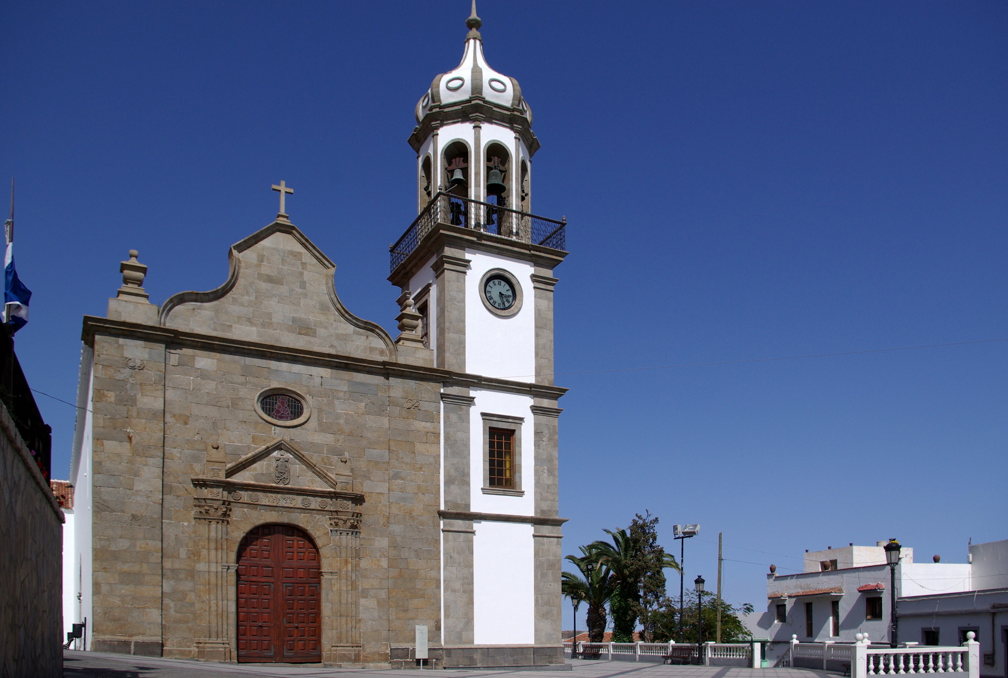 Teneriffa, Granadilla, Iglesia de San Antonio de Padua